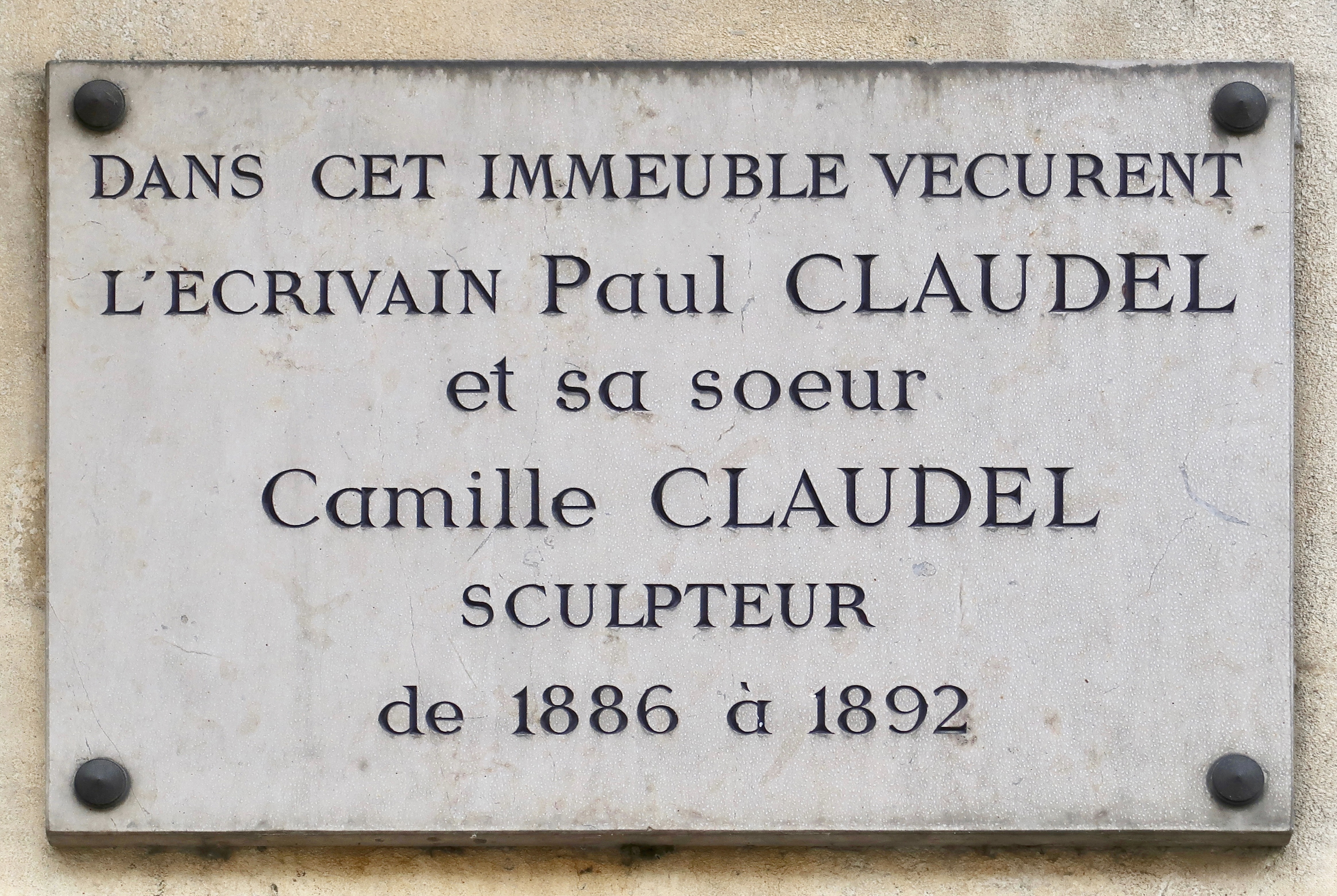 Plaque en hommage à Paul et Camille Claudel, 31 boulevard de Port-Royal (Paris, 13e).